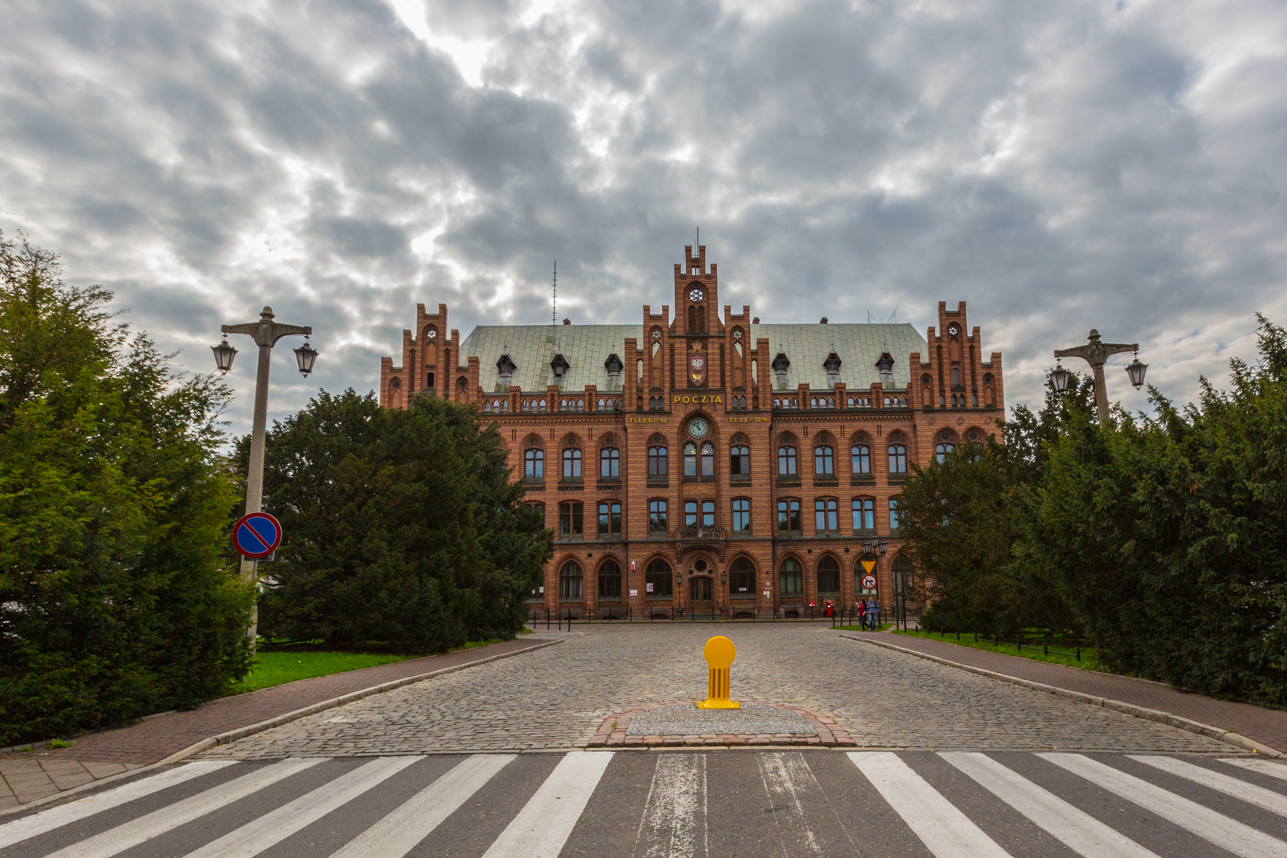 Budynek poczty w Koszalinie, ul. Lampego 22